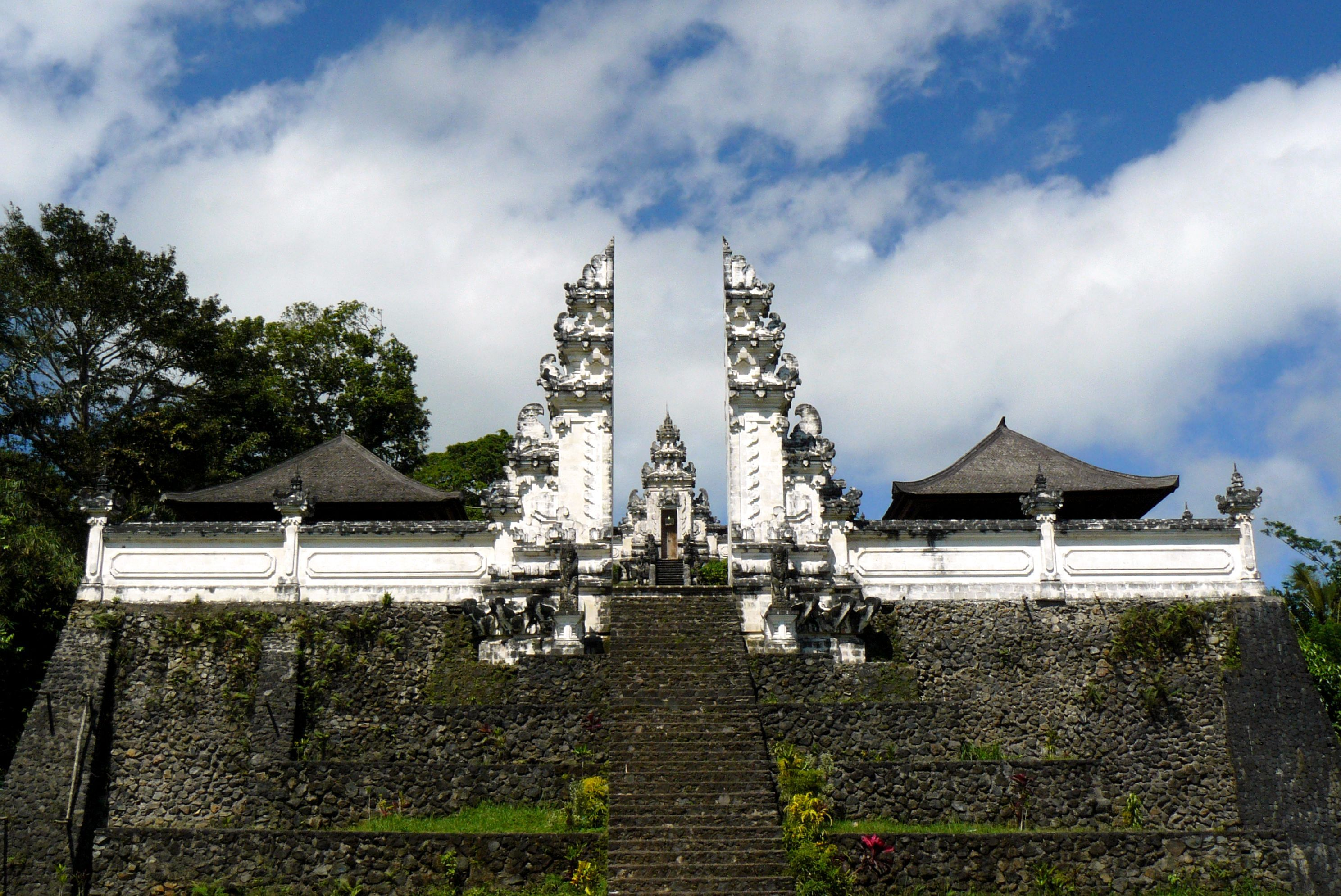 Pura Penataran Lempuyang, Gunung Lempuyang, Bali